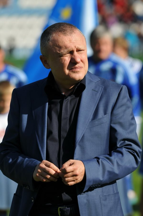 Ігор Суркіс на Матчі пам'яті Белькевича, Баля і Гусіна